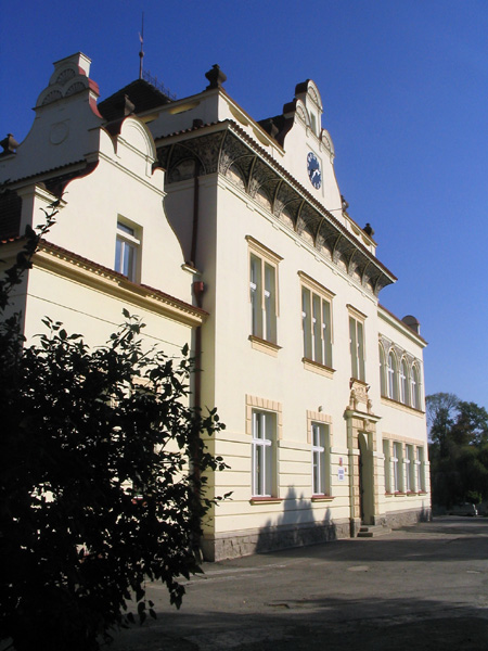 Novorenesanční budova školy v Úvalech